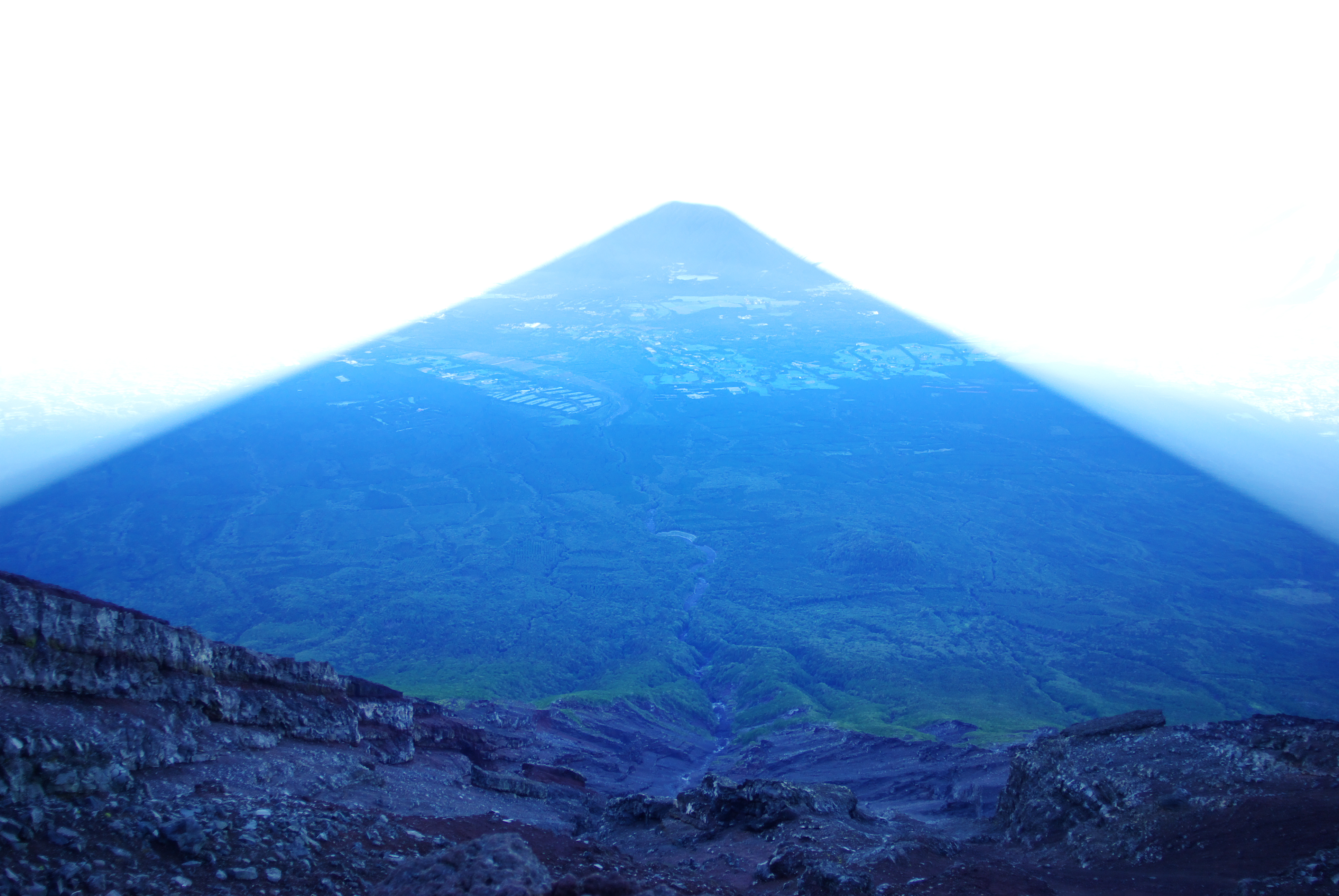 富士山山頂から見た影富士と大沢崩れ